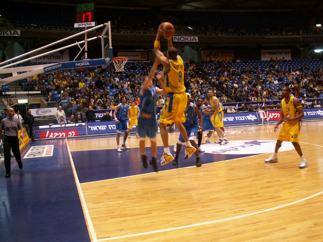 אנתוני פארקר צולם על-ידי אבי קדמי This picture was taken by Avi Kedmi